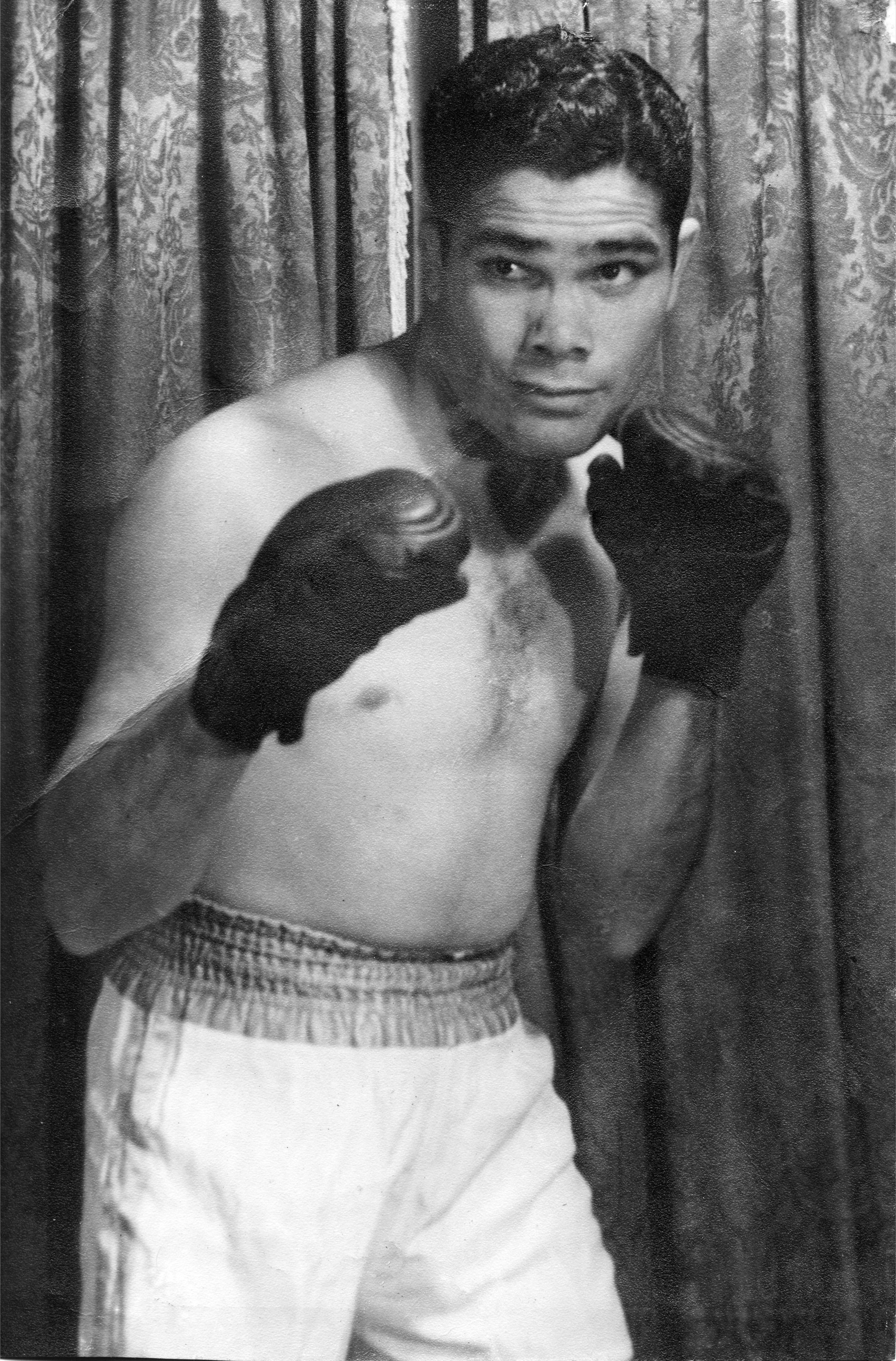 Ángel Leyes (1930-1996), boxeador argentino, campeón argentino y latinoamericano.